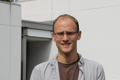 Aaron Naber Oberwolfach 2015